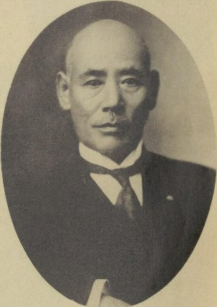 名和長憲（1864-1939）